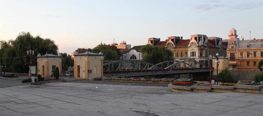 Eisenbrücke in Lugosch